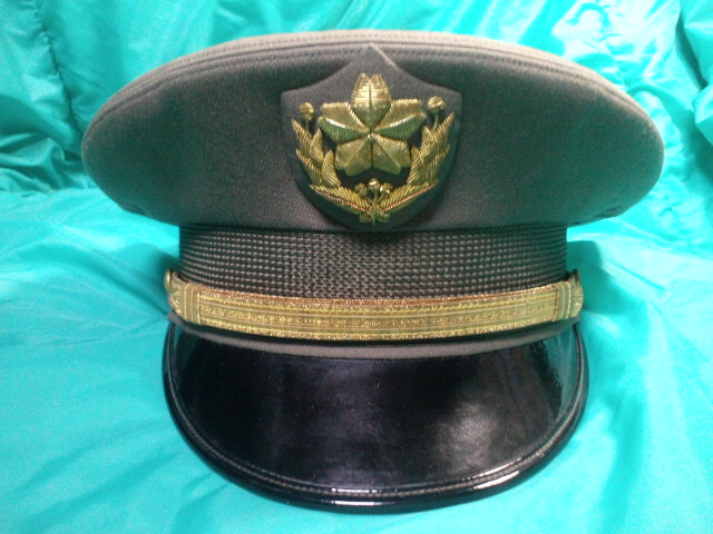 70式幹部正帽